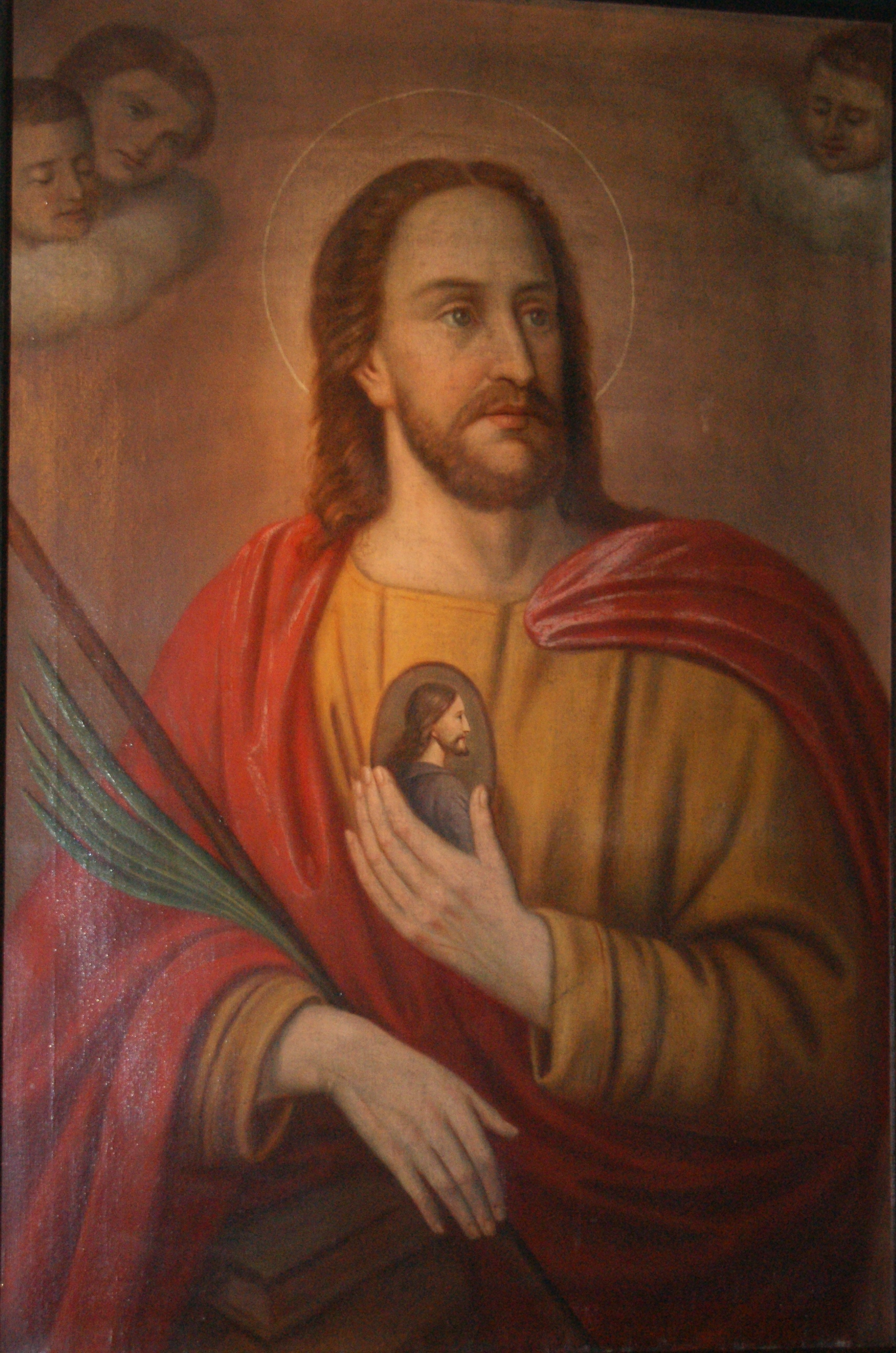 Judas Thaddäus, Gemälde in der katholischen Kirche von Heisterbacherrott